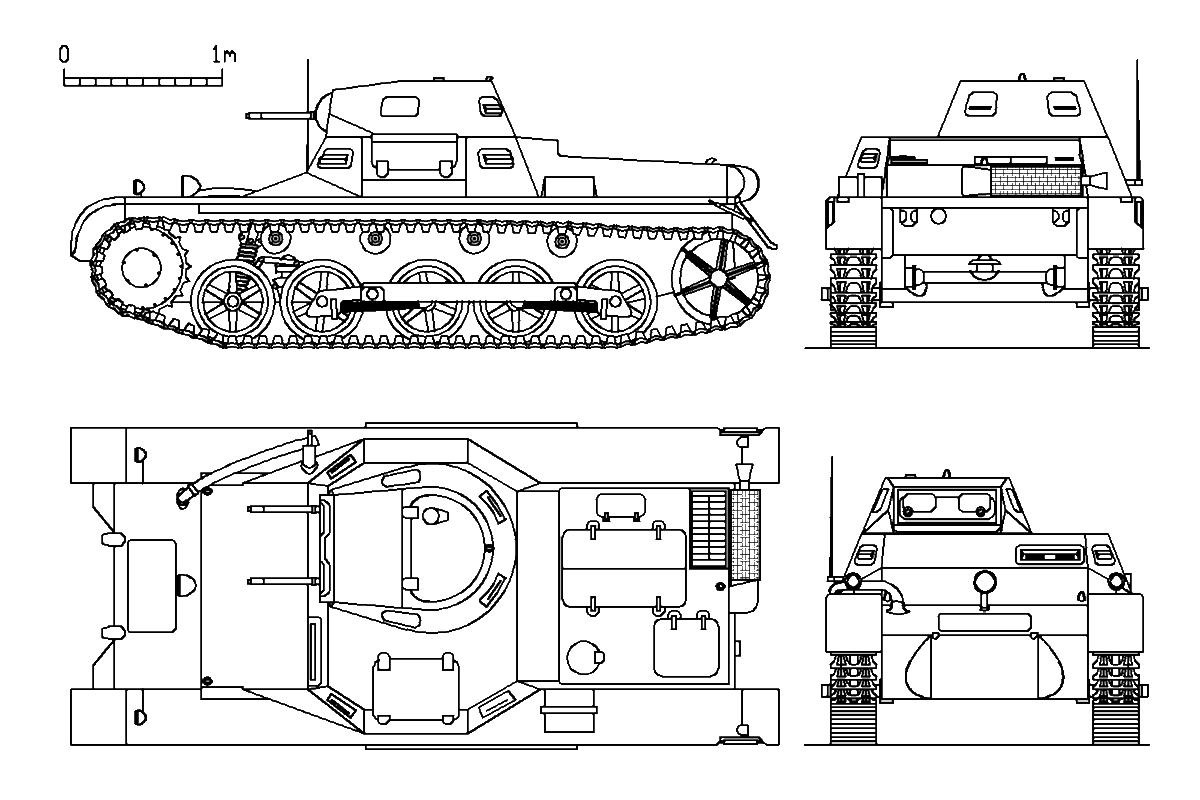 PzKpfw I B (plans)